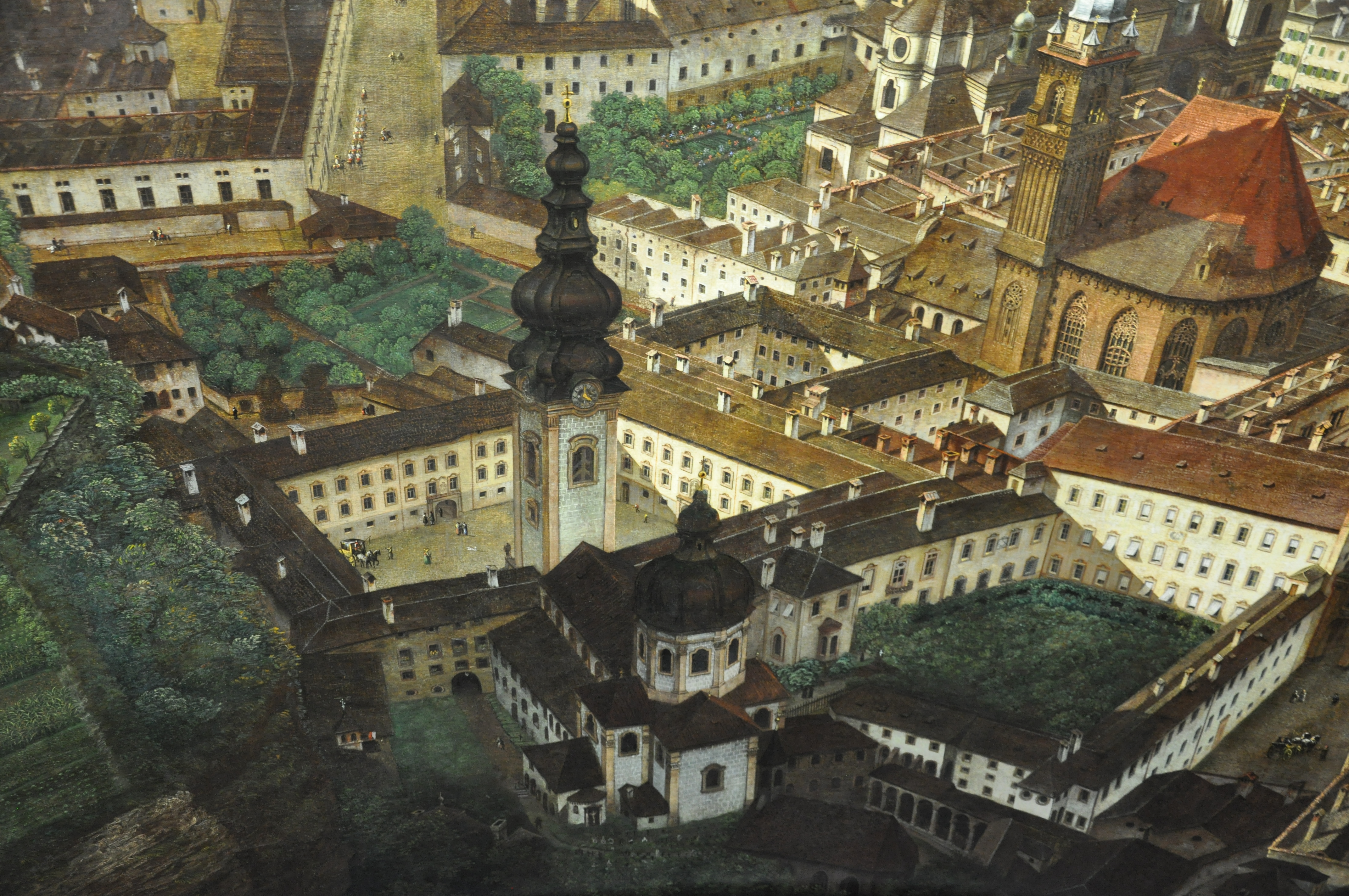 Panorama der Stadt Salzburg von Johann Michael Sattler, 1825–1829. Panoramamuseum des Salzburg Museums. Stift Sankt Peter